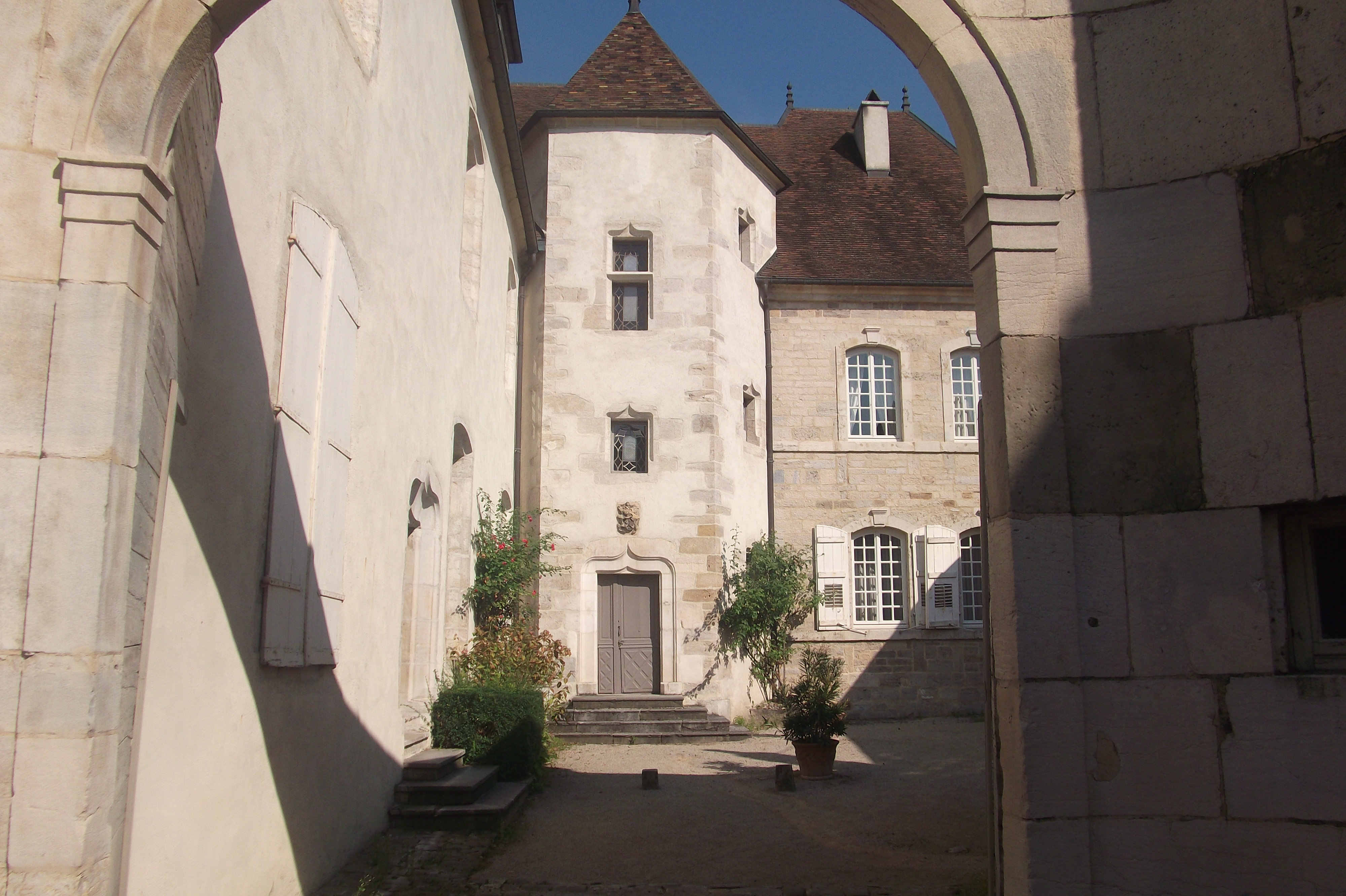 L'hôtel de Magnoncourt de Vesoul (Haute-Saône, Franche-Comté)